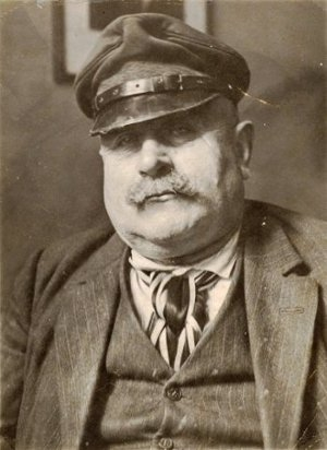 Jan Eskymo Welzl (1868 - 1948), Český cestovatel, lovec a zlatokop.